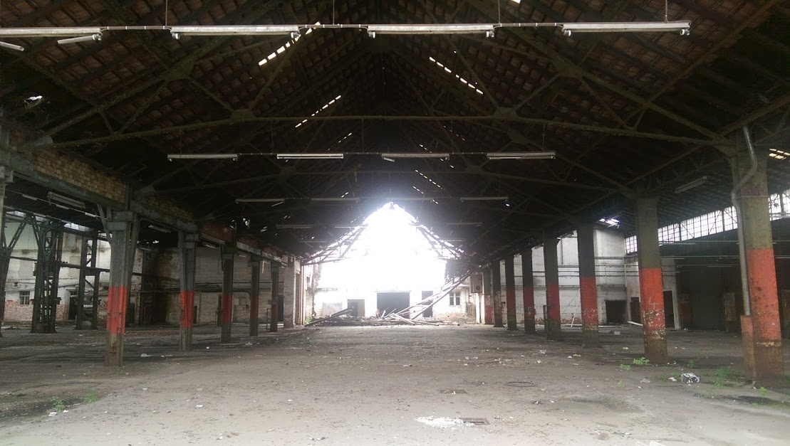 Erfurt Bw P